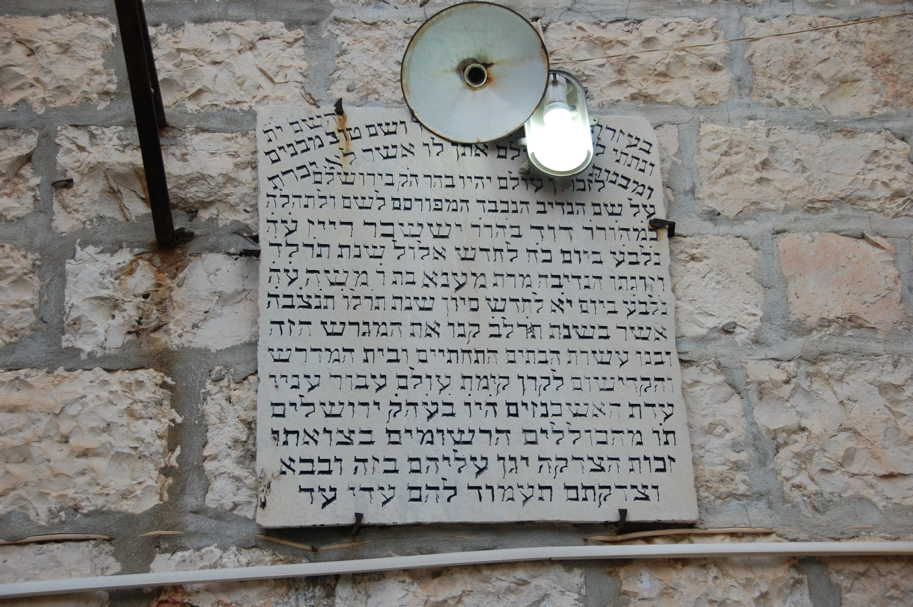 Beit David, Jerusalem